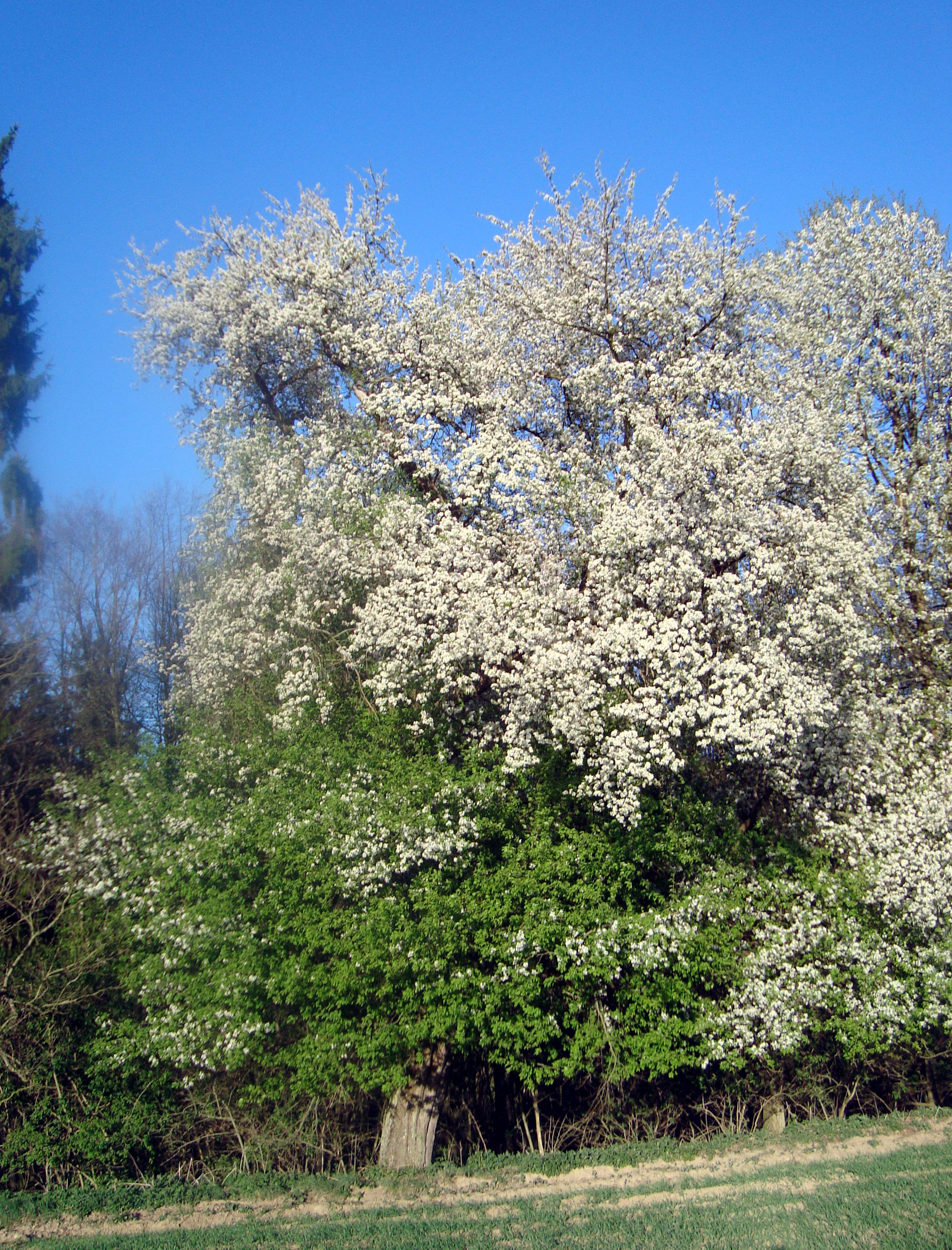 Jabloň planá Podkomorské lesy